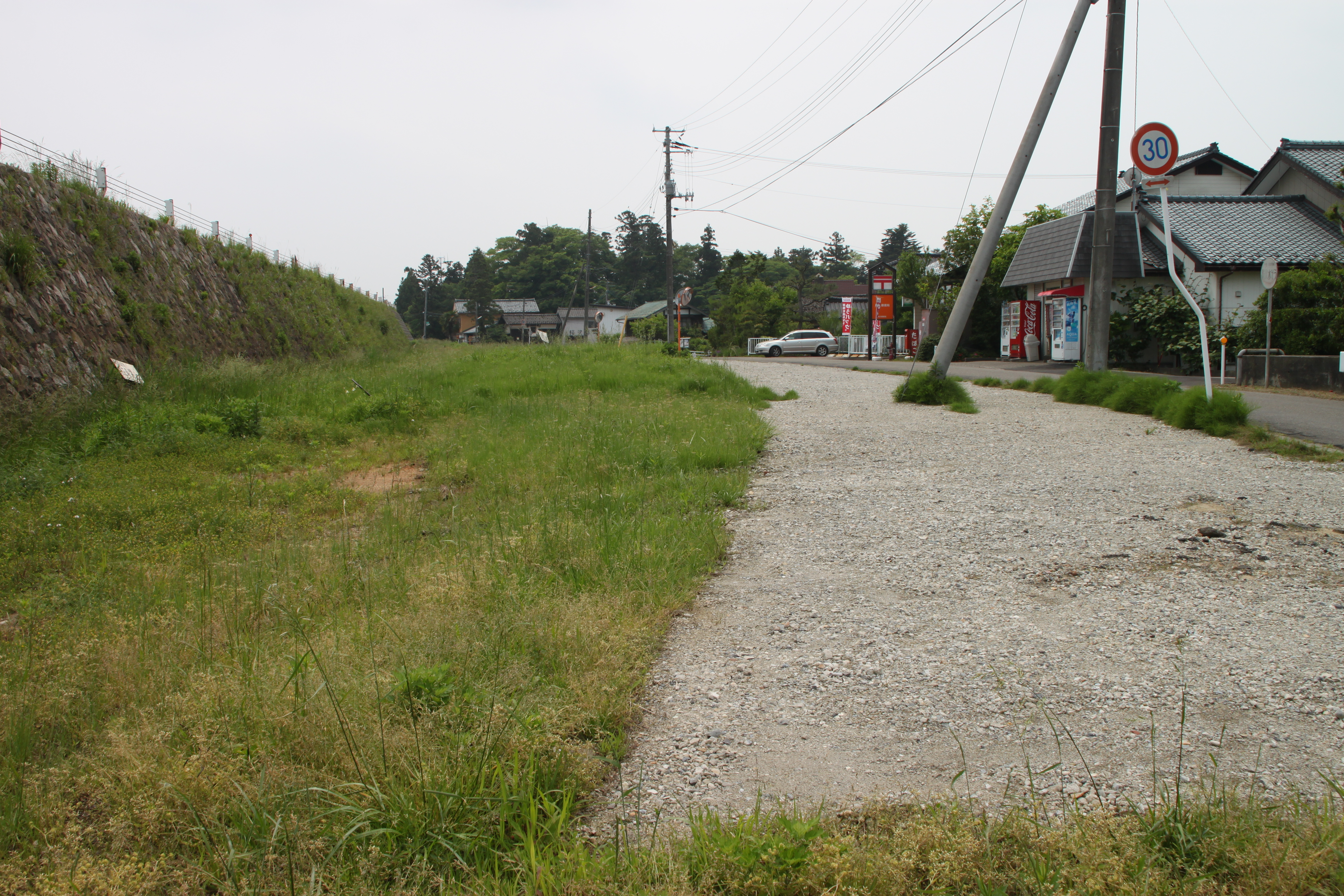 新潟交通味方駅跡。